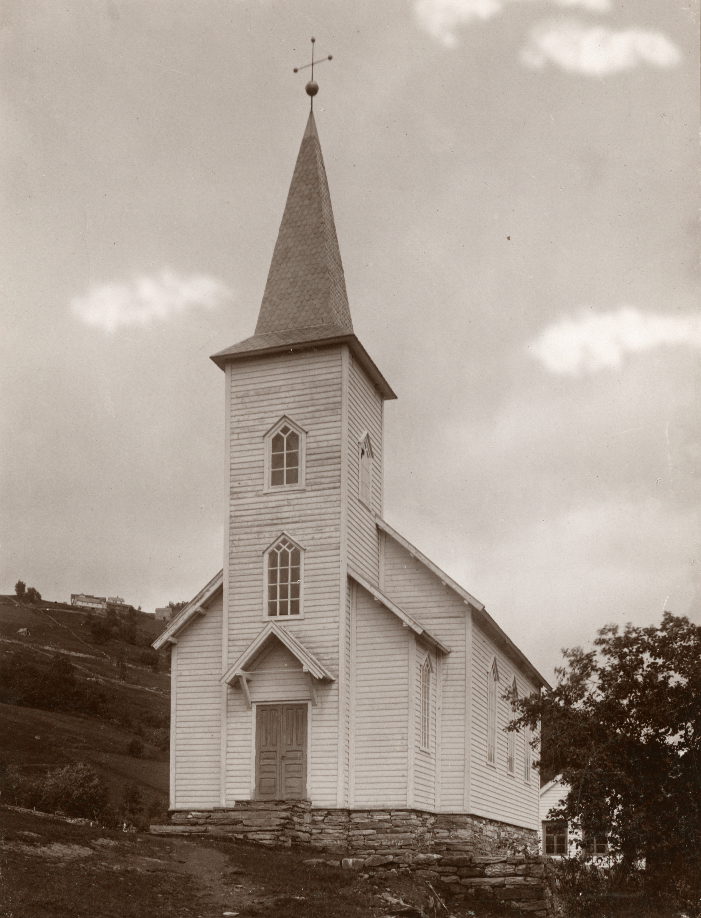 Fet kirke i Fet, Sogn og Fjordane This image on crowdsourcing geotagging platform Fotodugnad